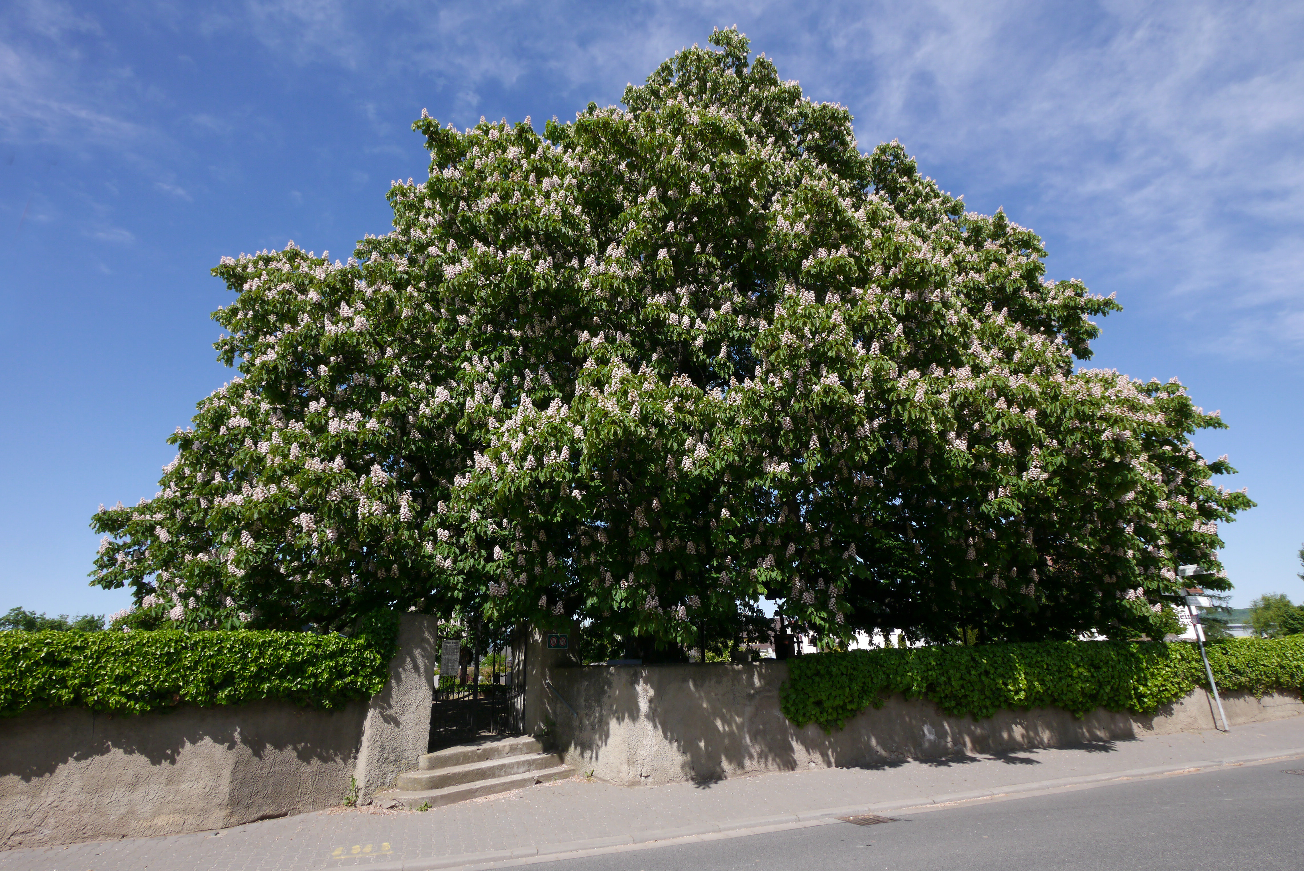 Ockenheimer Rosskastanie (Aesculus hippocastanum), circa 1650 gepflanzt, Naturdenkmal (ND-7339-017), auf dem Friedhof in Ockenheim (Rheinland-Pfalz), gegenüber Gaulsheimer Straße 14